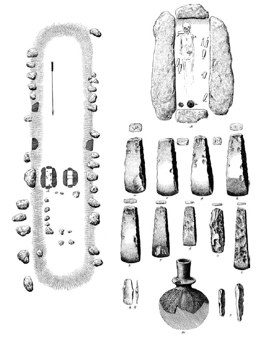 Grundriss des Dolmens von Bogø und Zeichnung der Grabbeigaben